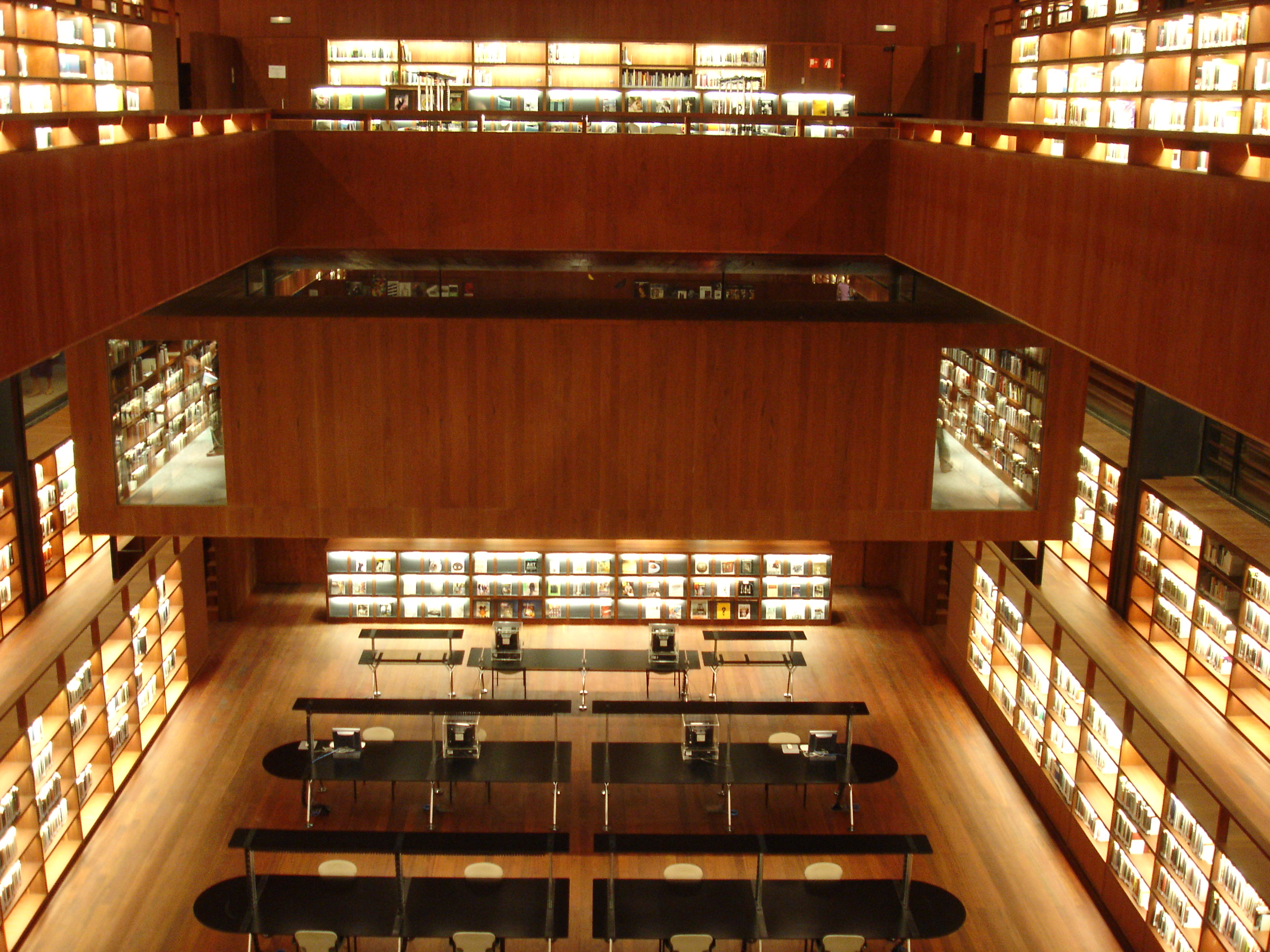 Biblioteca Museo Reina Sofía, sala de lectura